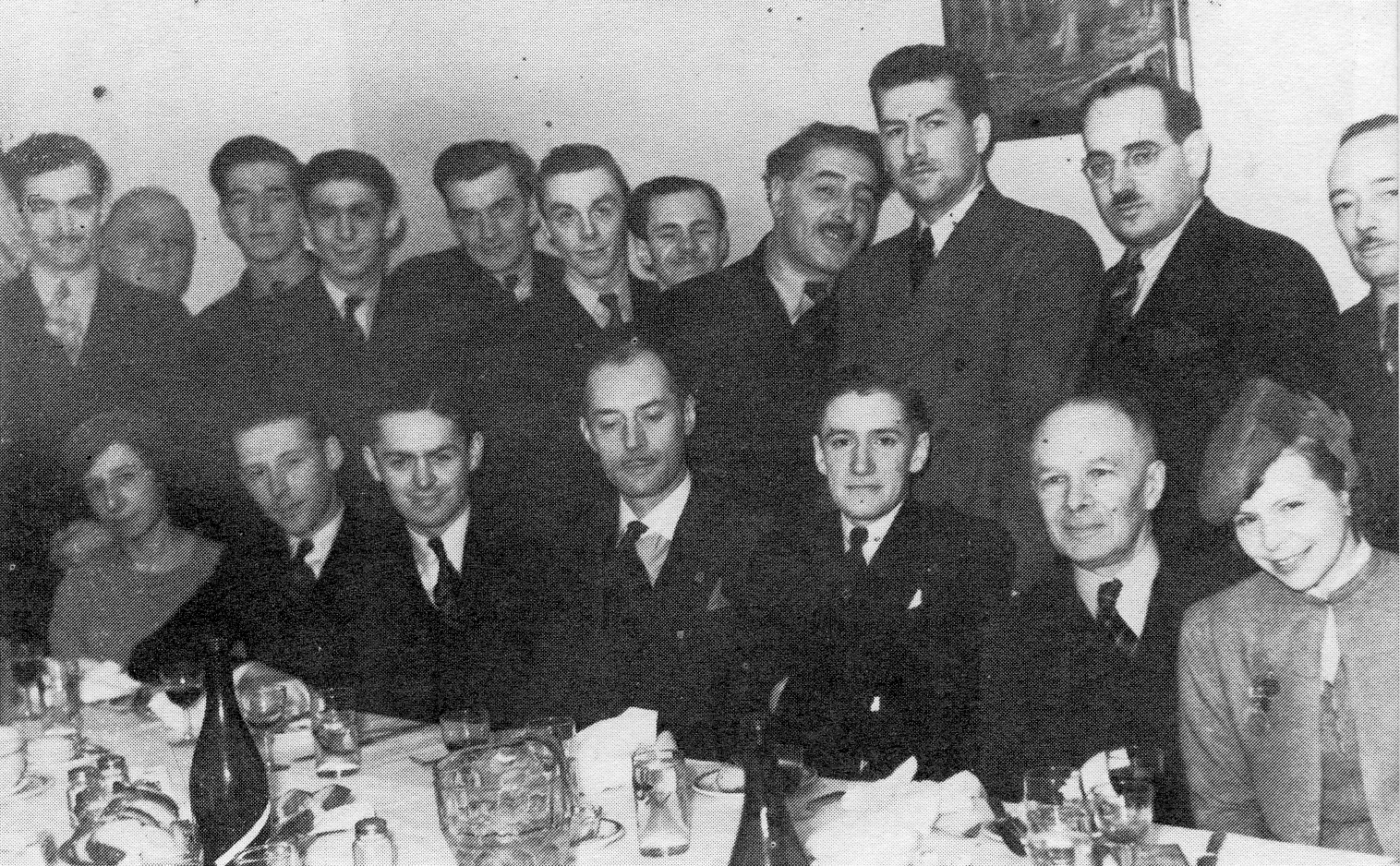 Photo d'un groupe de rédacteurs du journal L'Illustration Nouvelle, de Montréal (Québec, Canada). Assis, de gauche à droite : Medjé Vézina (pages féminines), Fernand Bilodeau (faits divers), Jean Bohémier (sports), Adrien Arcand (rédacteur en chef), Joseph Bourdon (directeur de l'information), Émile Délâge (directeur-gérant), Jovette-Alice Bernier (pages féminines). Debout, de gauche à droite : M. Pommier, J.-E.-A. Pin (chronique ouvrière), Gérard Dagenais, Roger Meloche (sports), Armand Jokisch (sports), Marc Thibeault (théâtre et cinéma), Albert Massicotte (information générale), Mario Duliani (information étrangère et culture), Marcel Laliberté (information générale), Alphonse Loiselle (information municipale), Louis Le Marchand (caricaturiste et tribunaux).